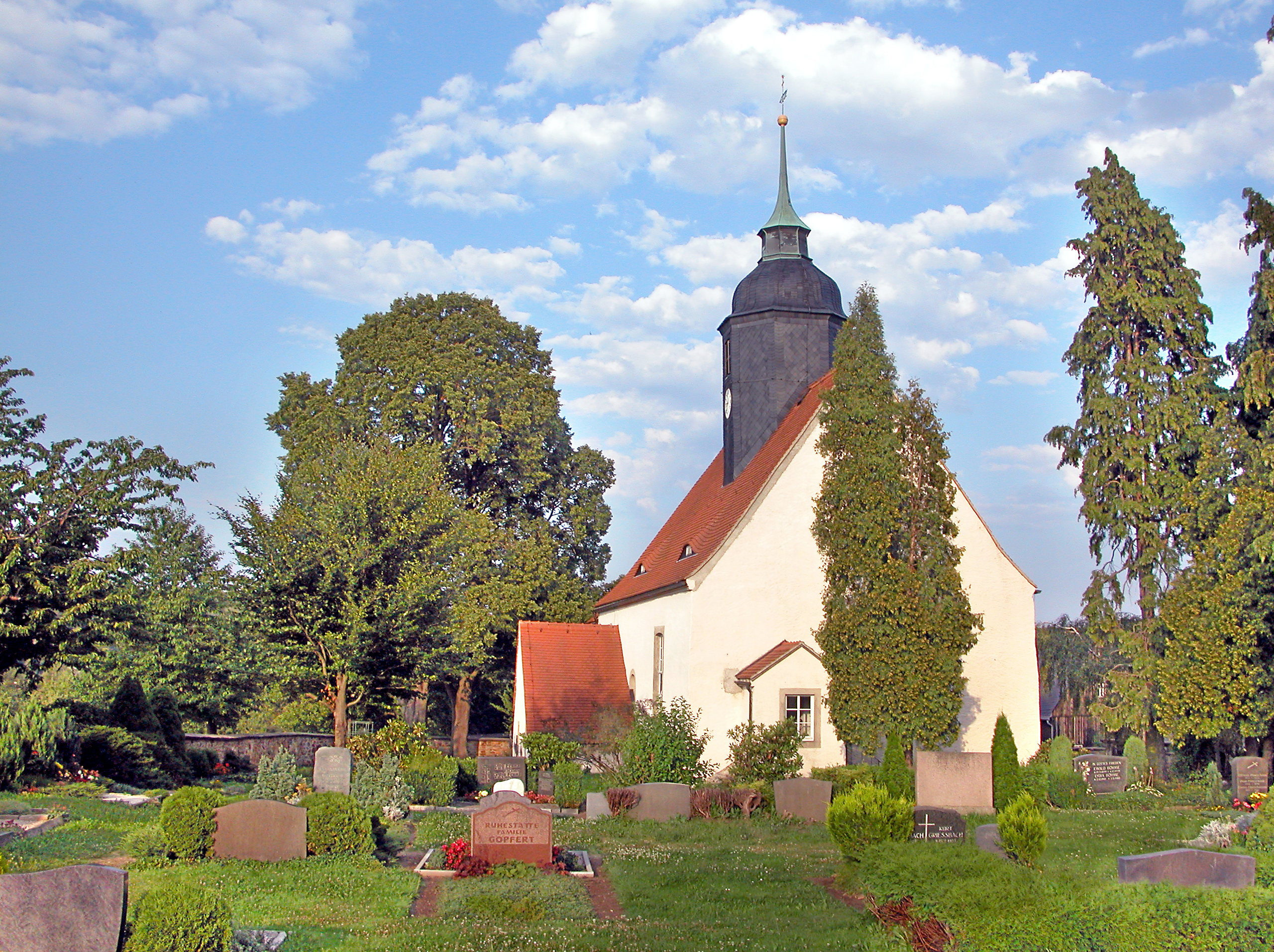 21.07.2007 01738 Dorfhain, Bergstraße (GMP: 50.932532,13.562630): Die Ursprünge der Dorfkirche liegen um 1350. Die heutige barocke Kirche ist aus der Zeit von 1724. 1983 erfolgte eine grundlegende Sanierung. Sicht von Südwesten. [DSCN28483.TIF]20070721105DR.JPG(c)Blobelt